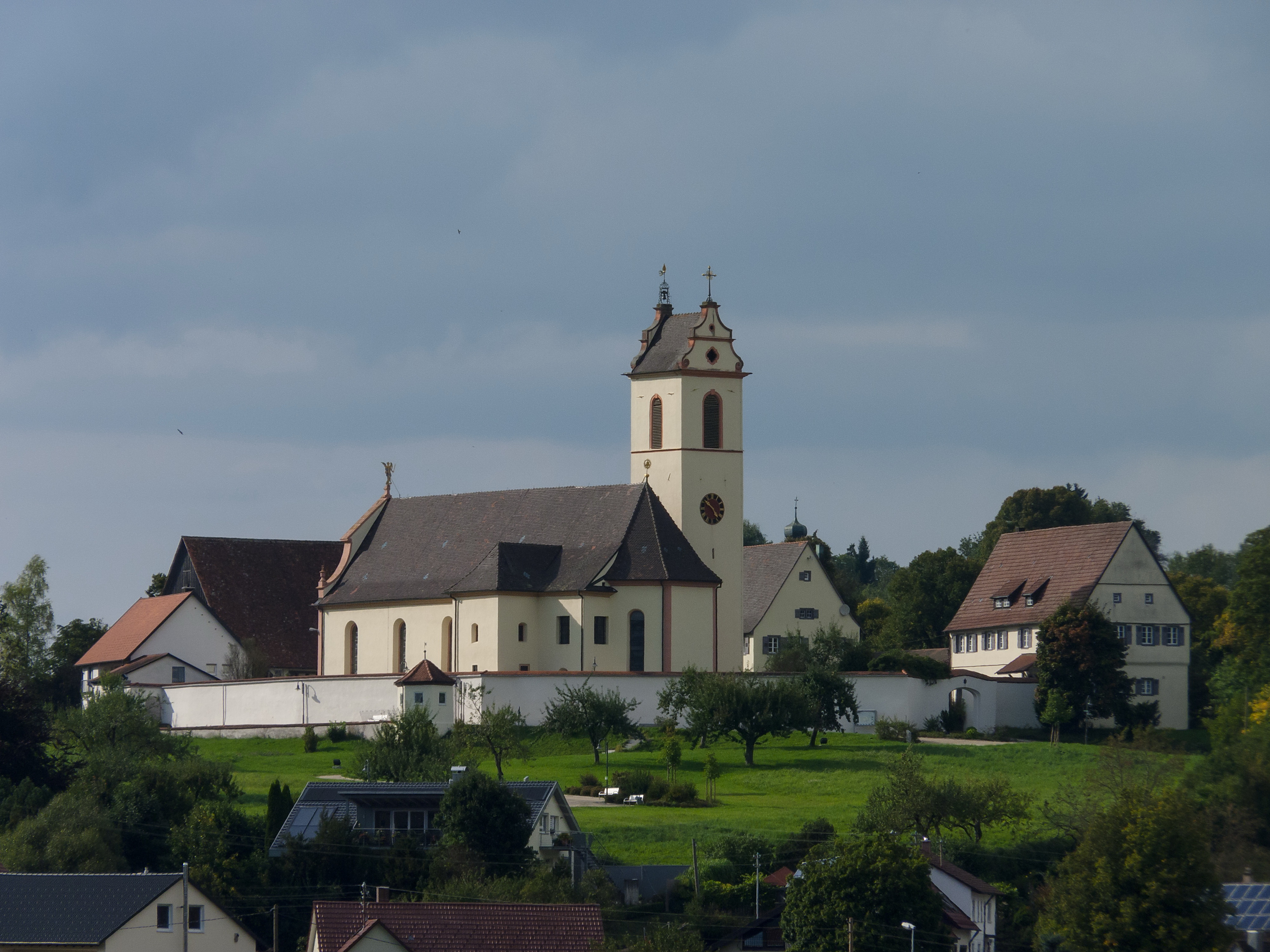 Blick auf den Kirchberg in Seitingen-Oberflacht